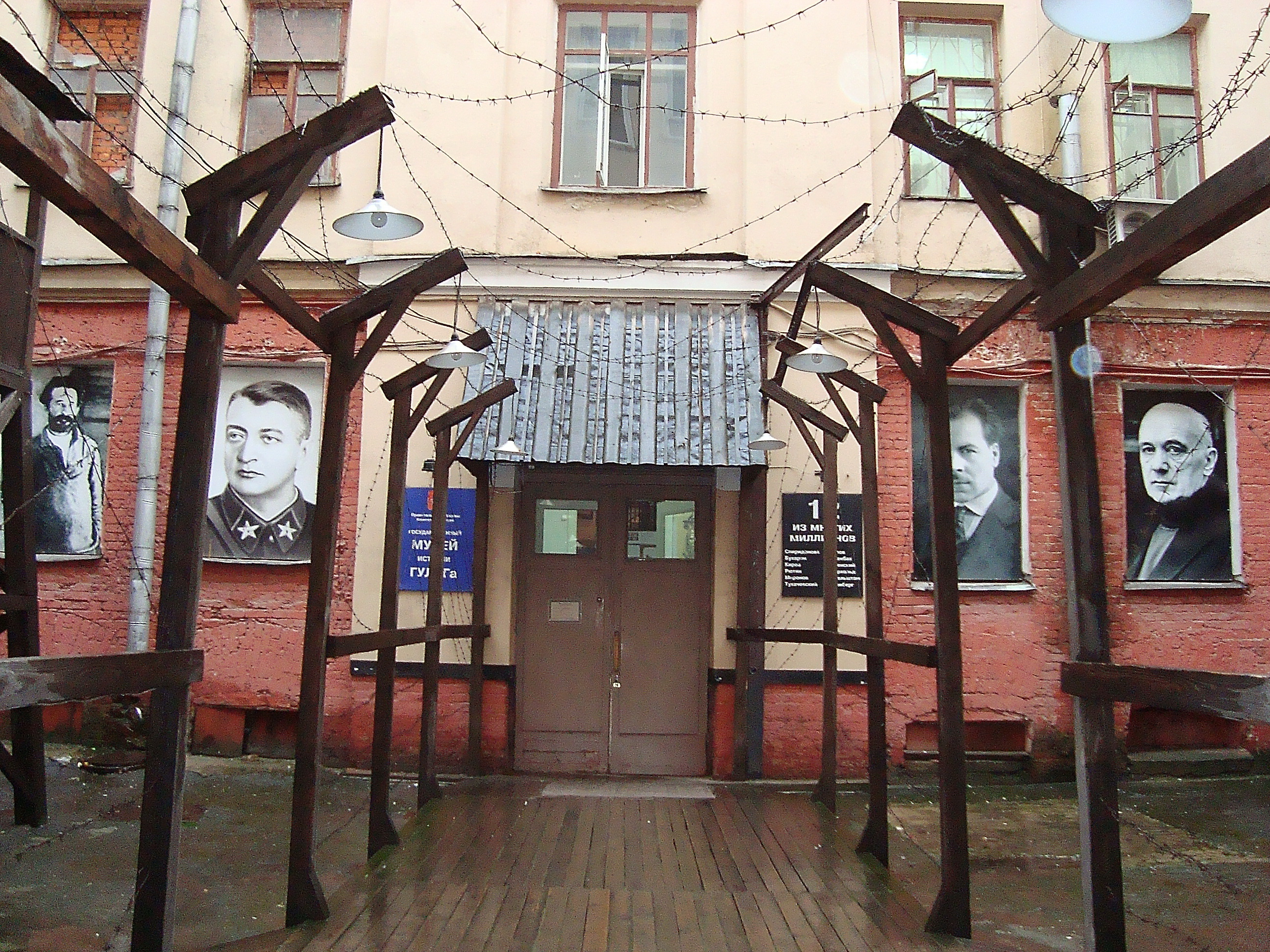 Музей ГУЛАГ